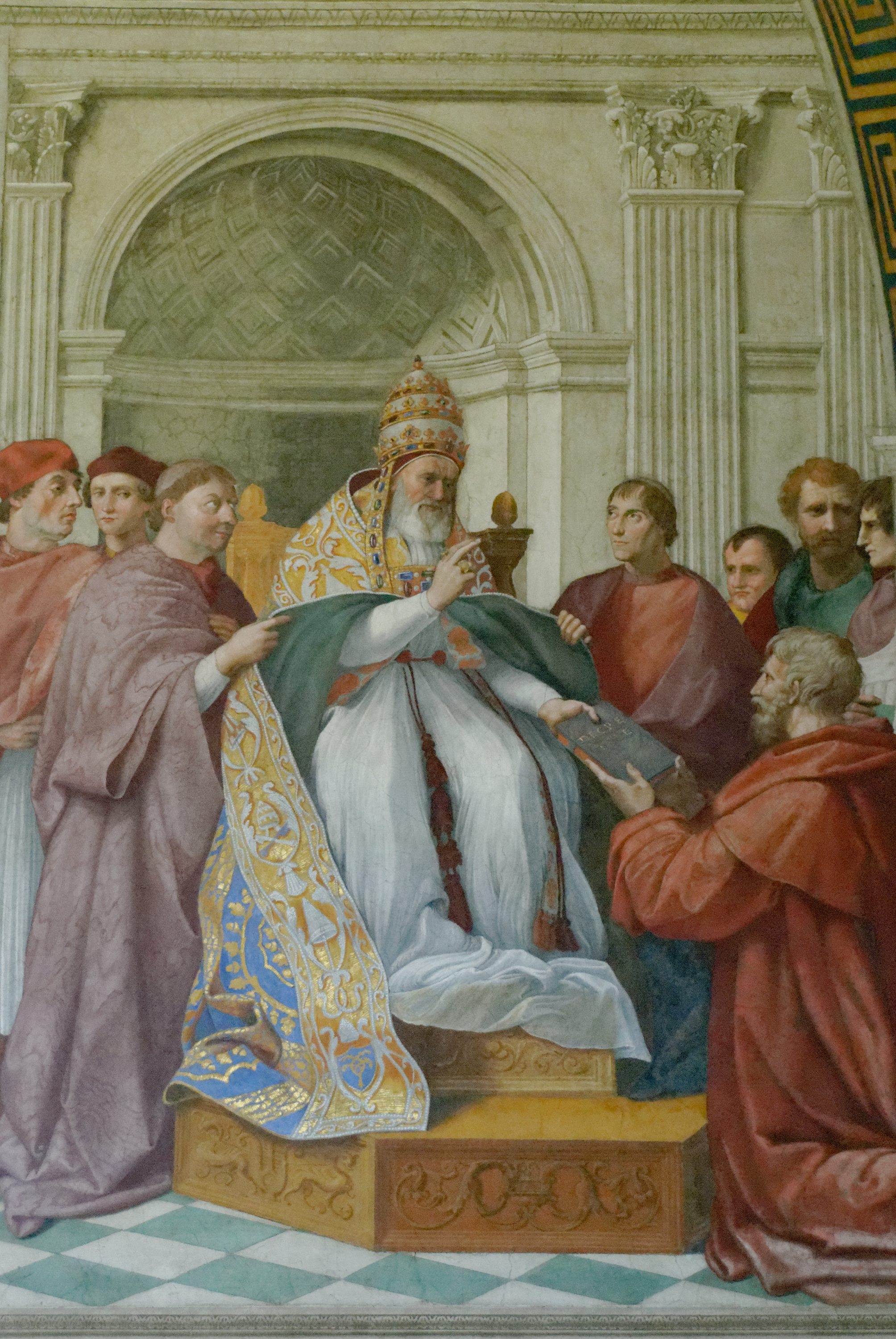 Il papa Gregorio IX che riceve le Decretali da Raimondo di PeñafortPrope Gregory IX approves the Decretals handed to him by St Raymond of Penafortlabel QS:Lit,"Il papa Gregorio IX che riceve le Decretali da Raimondo di Peñafort"label QS:Len,"Prope Gregory IX approves the Decretals handed to him by St Raymond of Penafort"label QS:Lfr,"Le pape Grégoire IX approuve les Décrétales que lui remet S. Raymond de Penãfort"